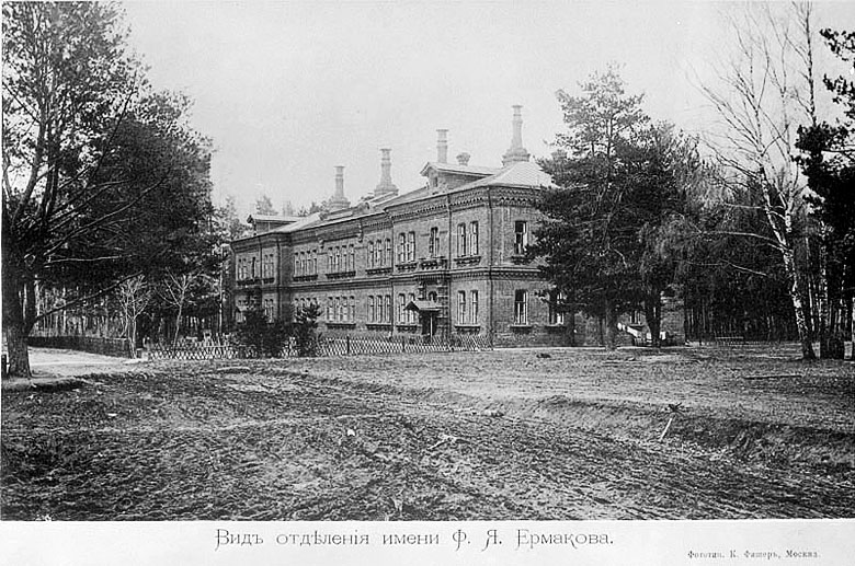 Вид на отделение имени Ф. Я. Ермакова психиатрической больницы имени Н. А. Алексеева